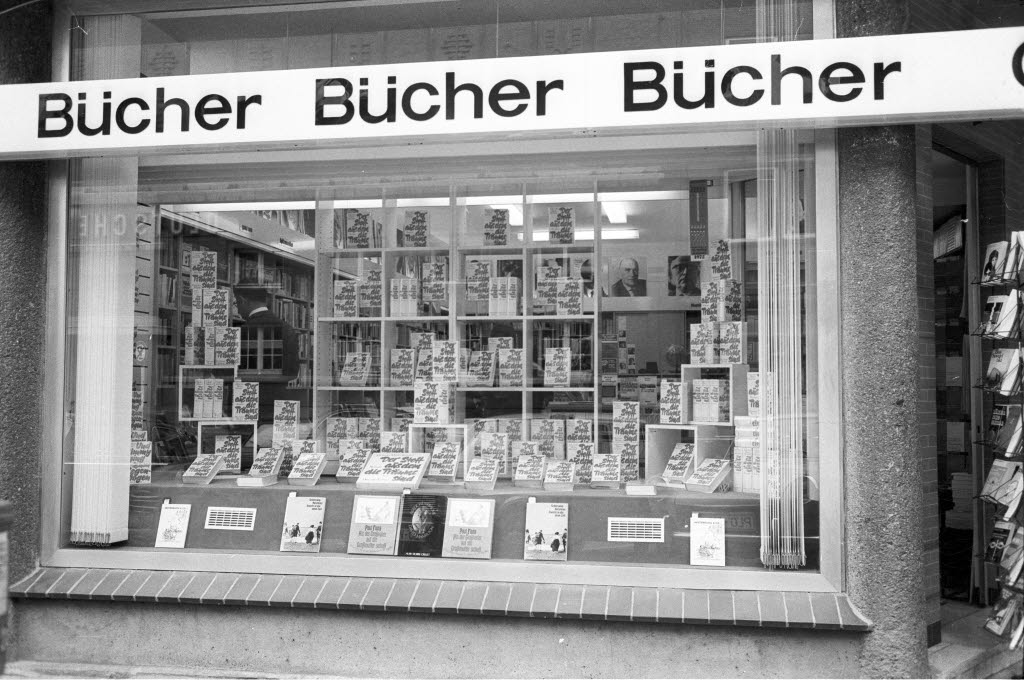 Die Auslage beschränkt sich fast ausschließlich auf den aktuellen Bestseller von Johannes Mario Simmel, "Der Stoff, aus dem die Träume sind".